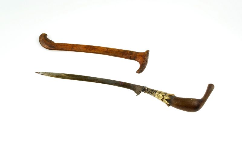 Dolk. Dolk met rechthoekig gebogen hoornen greep en houten schede Unknown language: Rencong